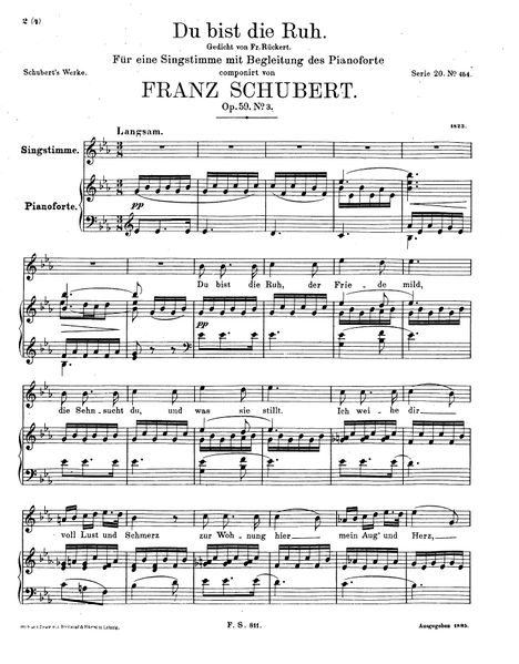 Edition de Mandyczewski en 1895 du Lied "Du bist die Ruh" de Schubert.